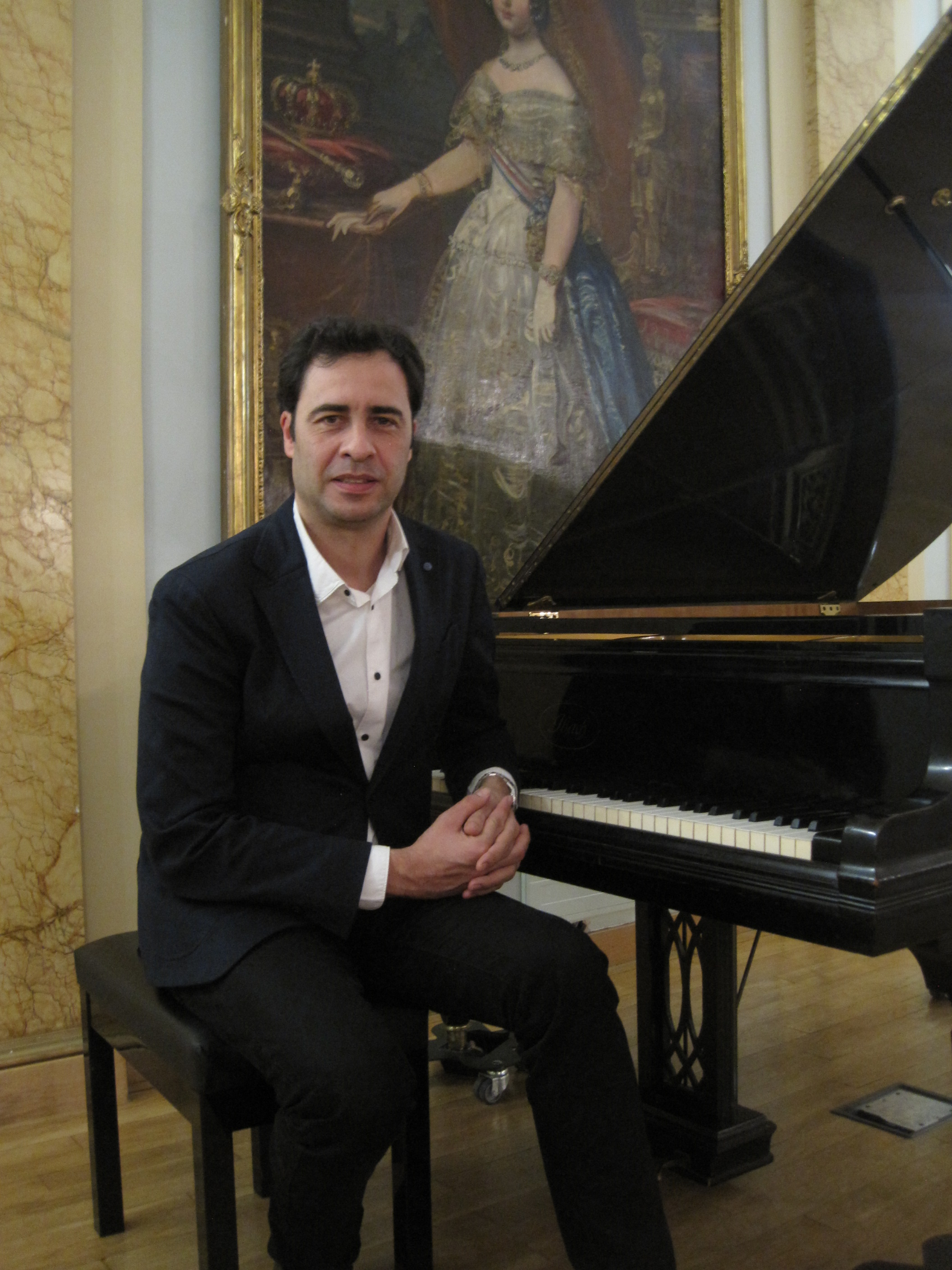 Alejandro Román, compositor y pianista español.